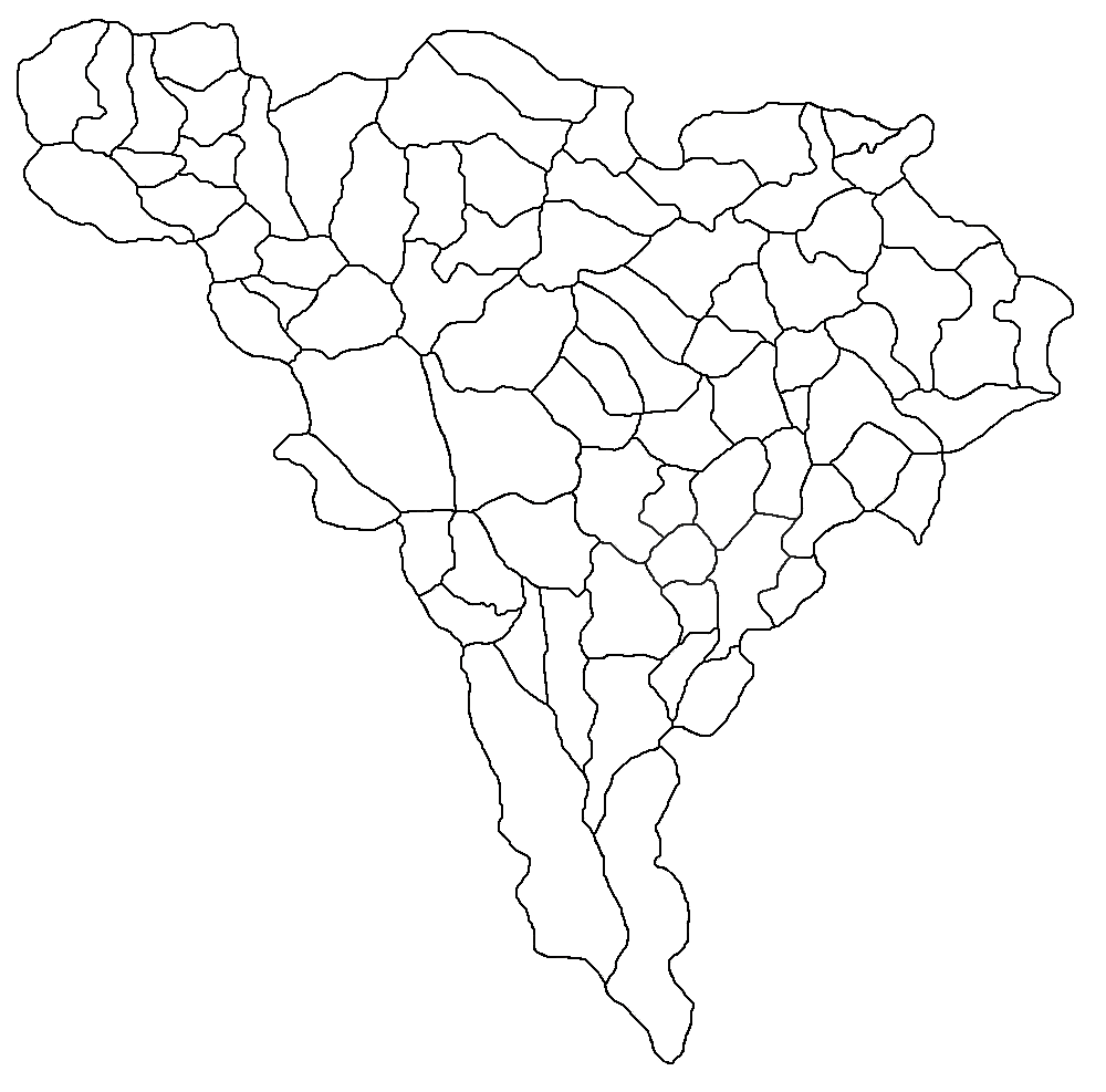 Categorie:Hărţi ale judeţului Alba